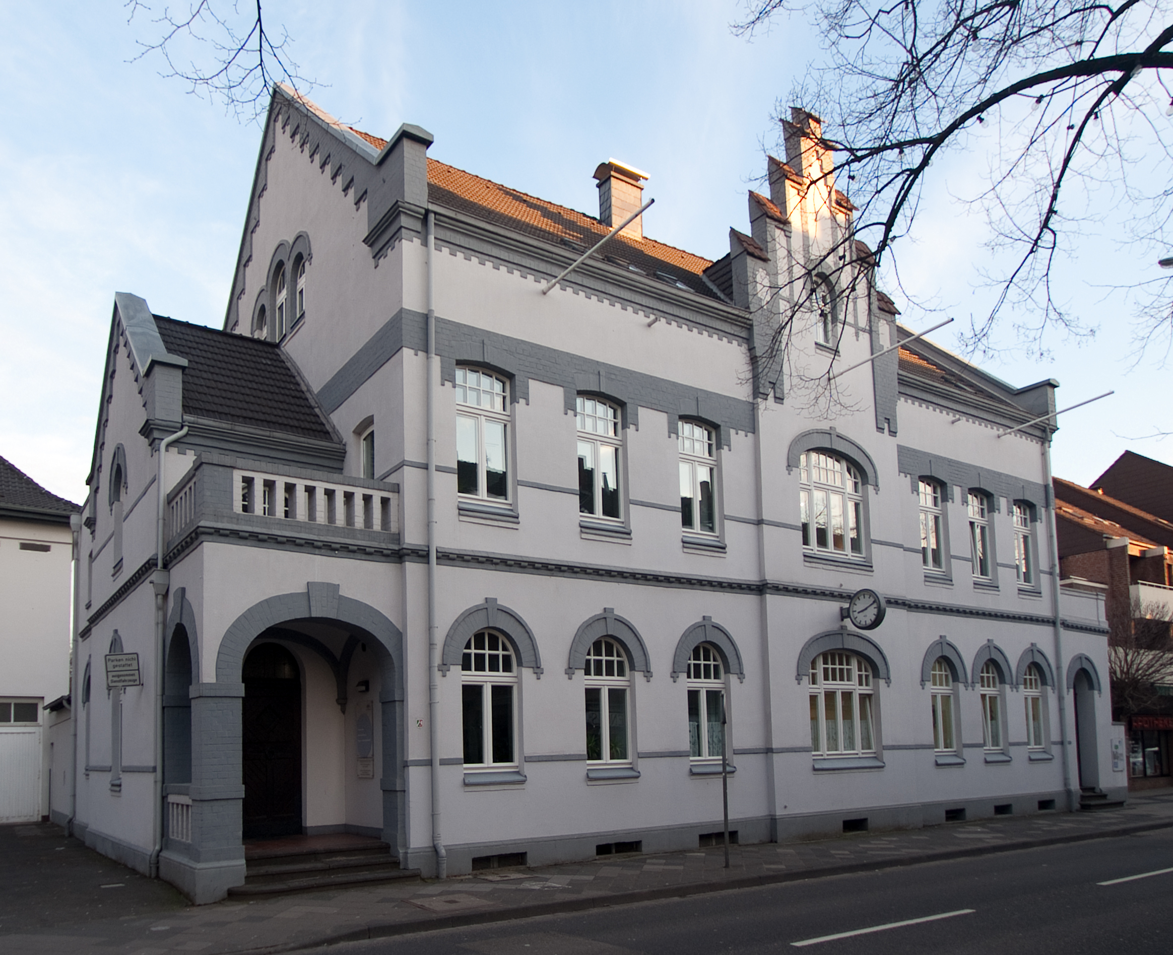 Rathaus Meerbusch Büderich